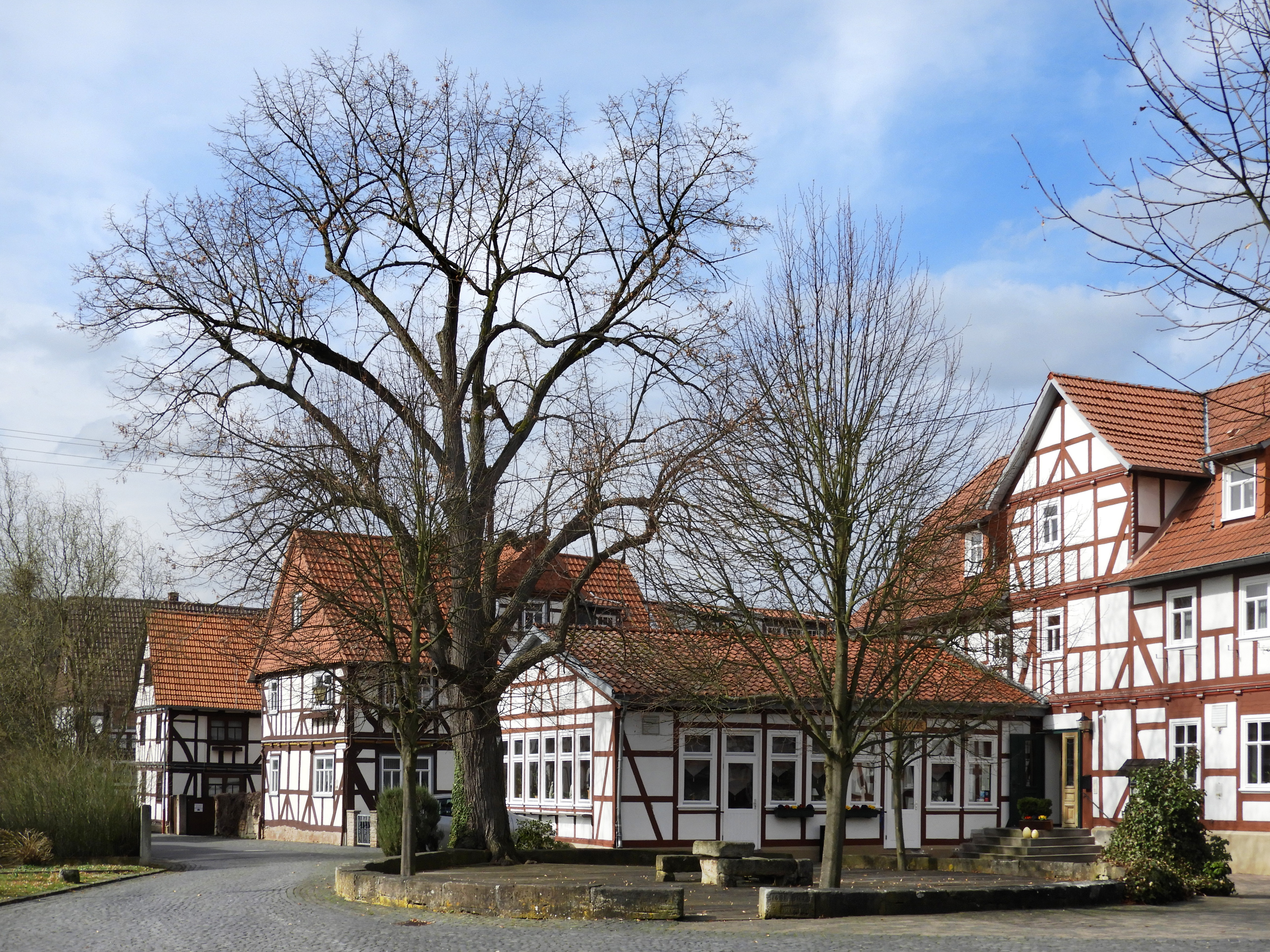 Der Anger in der Ortsmitte nahe dem Kirchhof gilt als ein besonders schöner Lindenplatz. In der runden Ummauerung steht ein Baum der, ohne urkundliche Bestätigung, 1825 bei der Umgestaltung der Anlage gepflanzt worden sein soll. Die drei anderen Linden sind Nachpflanzungen aus späterer Zeit. Als ehemaliger Gerichts- und Versammlungsplatz ist der Anger aus geschichtlichen Gründen ein geschütztes Kulturdenkmal. Details Wanfried 61